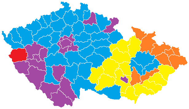 Volby do Evropského parlamentu v roce 2014 - vítězné strany podle okresů (světle modrá ANO, fialová TOP 09, žlutá KDU-ČSL, oranžová ČSSD, červená KSČM)